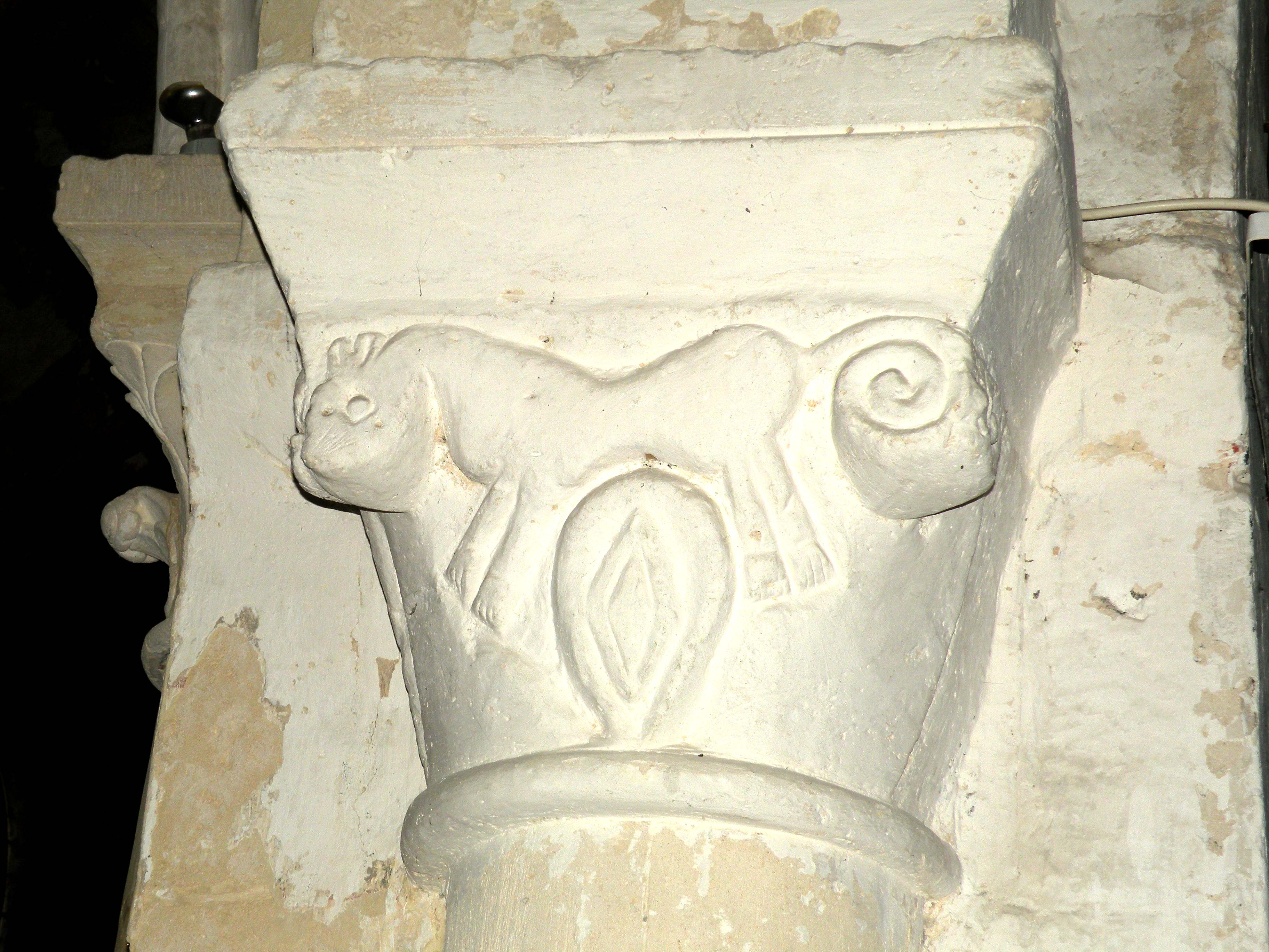 Intérieur de l'église Saint-Pierre-Saint-Paul d'Arronville